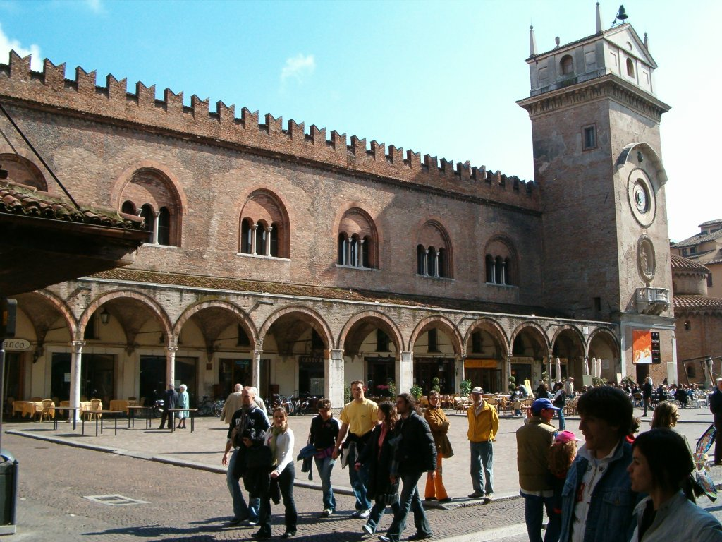 Palazzo della Ragione a Mantova, ItaliaMantova